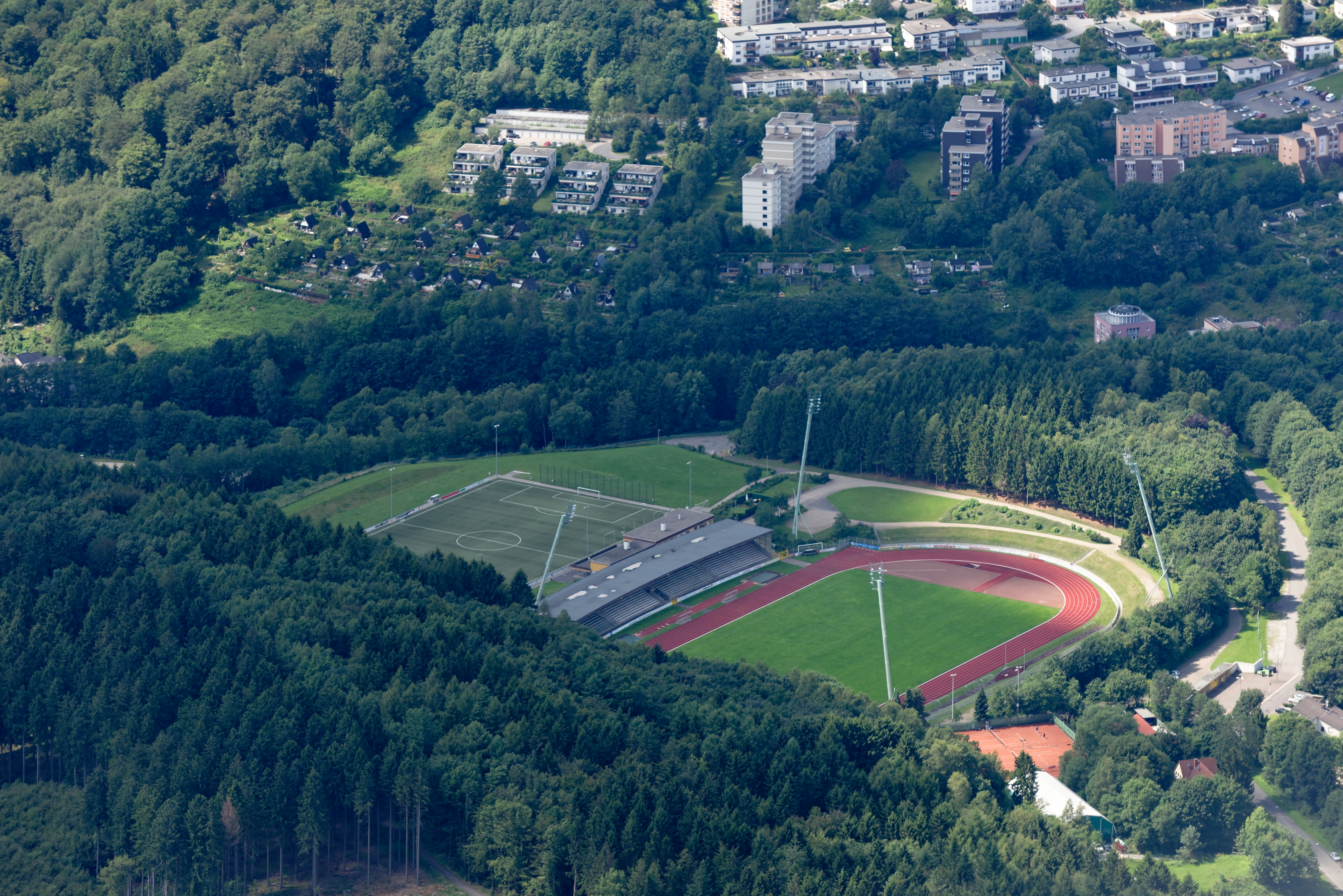 Luftaufnahme: Nattenbergstadion in Lüdenscheid, Nordrhein-Westfalen